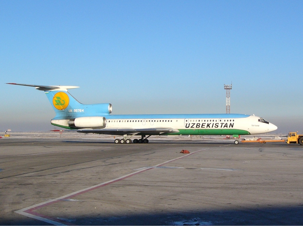 Uzbekistan Airways Tupolev Tu-154M